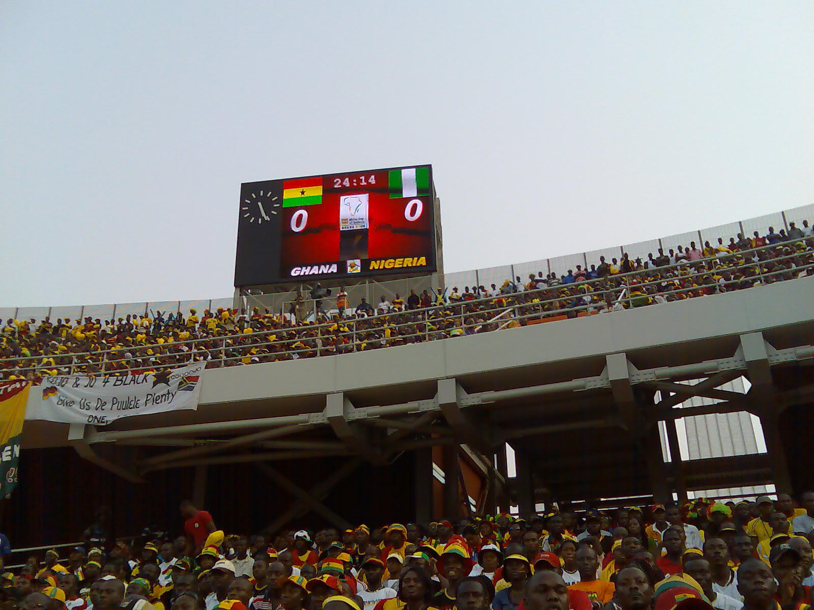 Viertelfinal Africa-Cup of nations 2008 Ghana - Nigeri 2:1